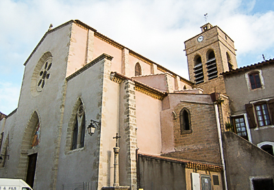 Église Saint-Pierre de Poussan (Hérault).